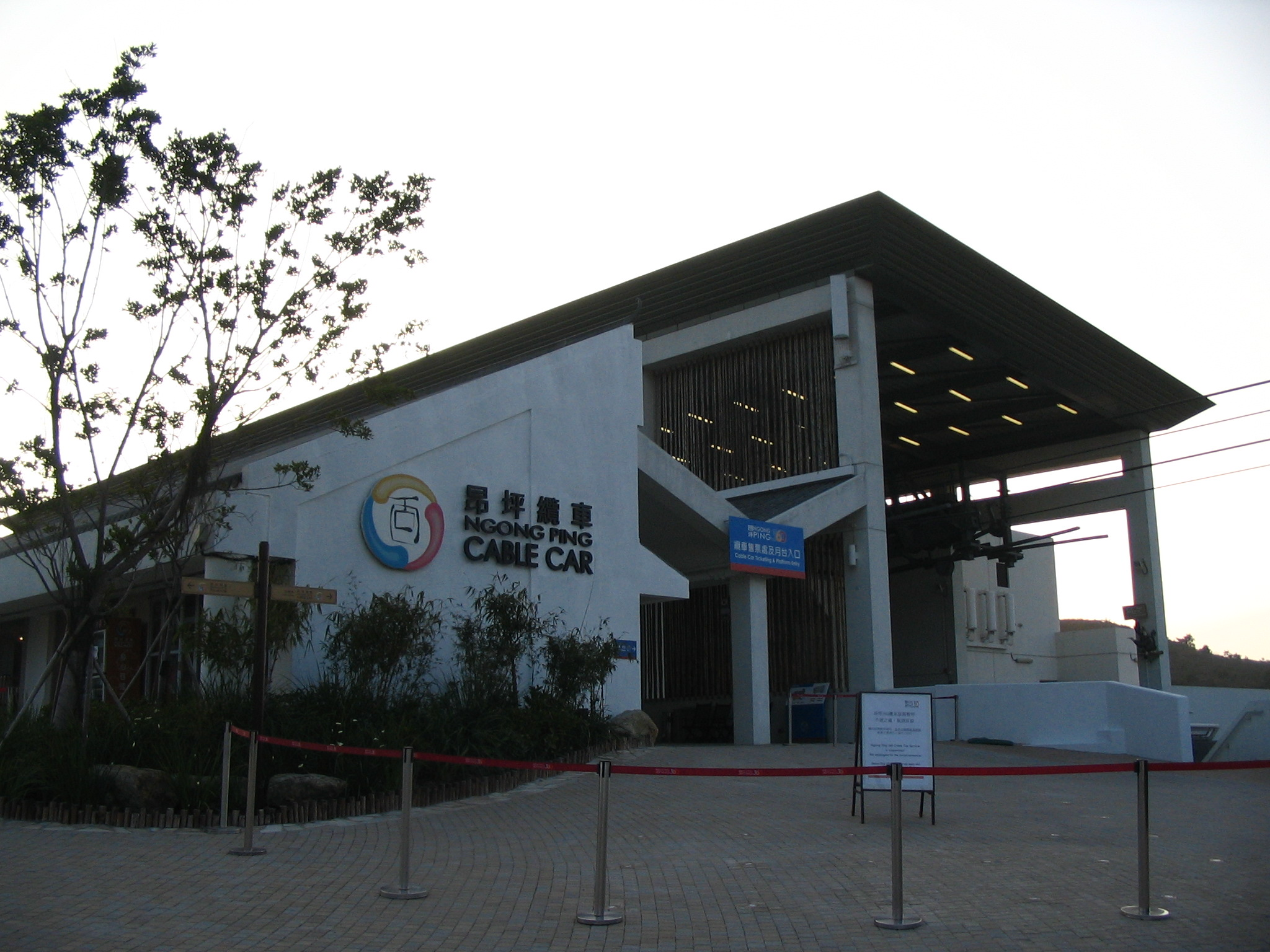 Photo of Ngong Ping Terminal